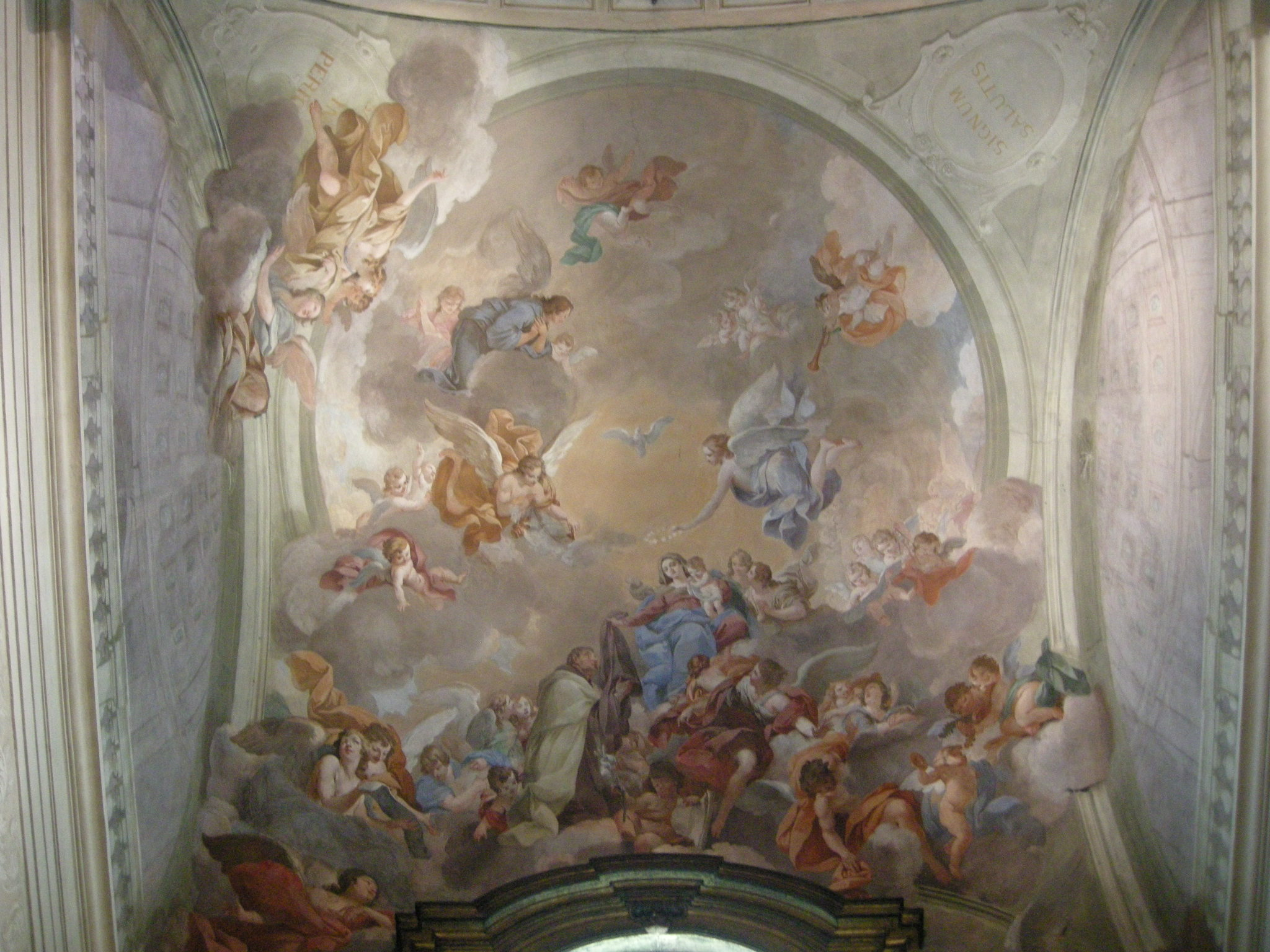 Cappella brancacci, cupola di vincenzo meucci2